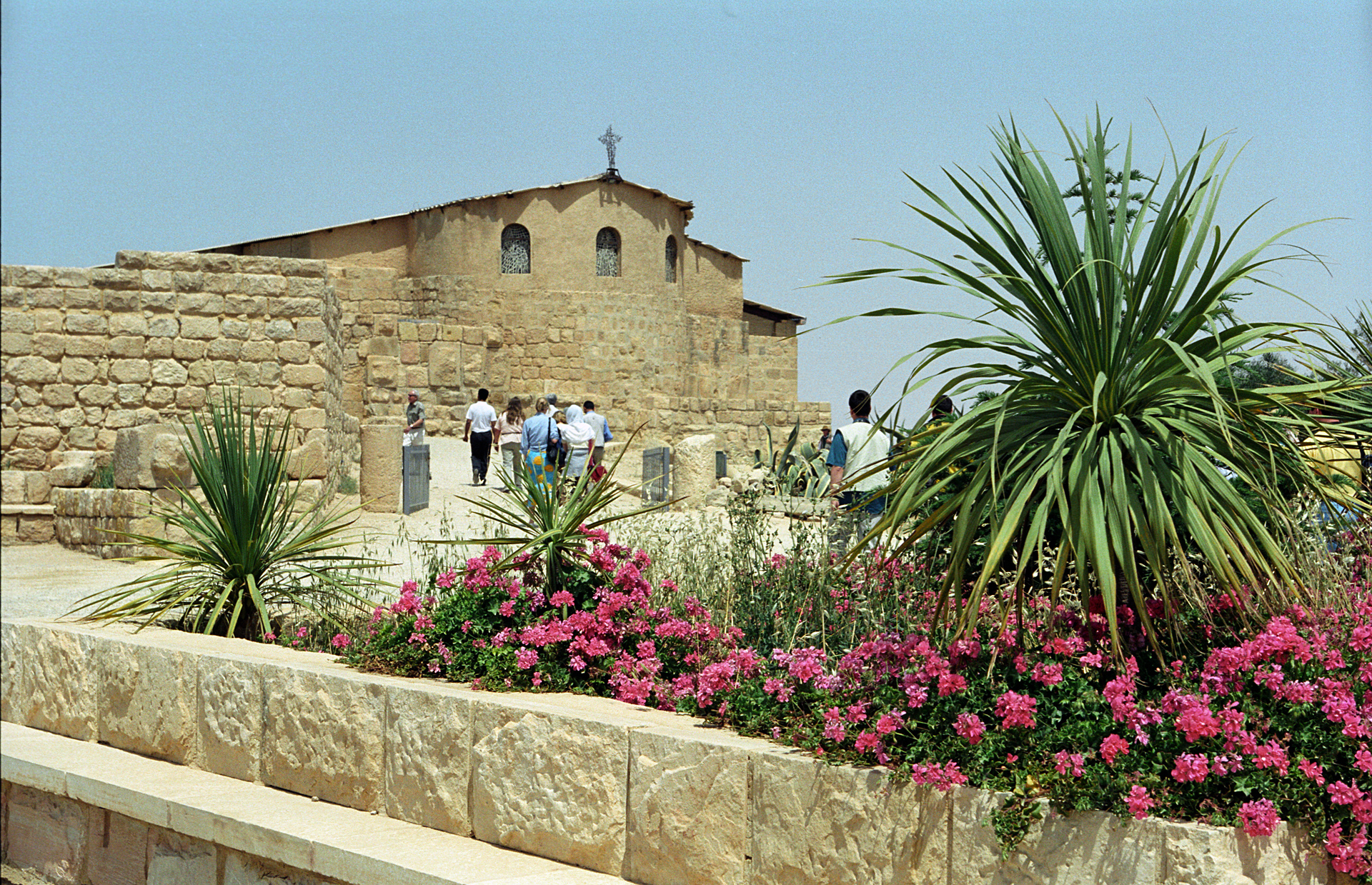 Mount Nebo, Jordan